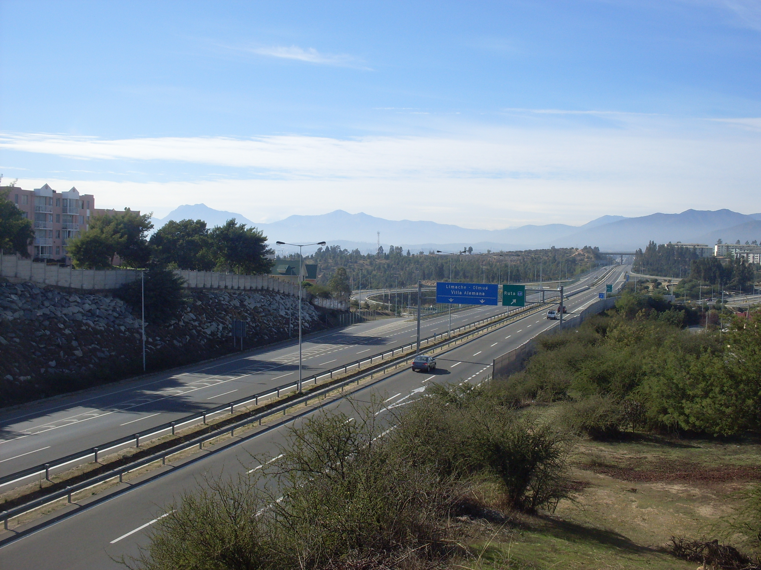 Autopista Troncal Sur, ruta 60-CH, a la altura del enlace con calle Marga-Marga, hacia Quilpué.